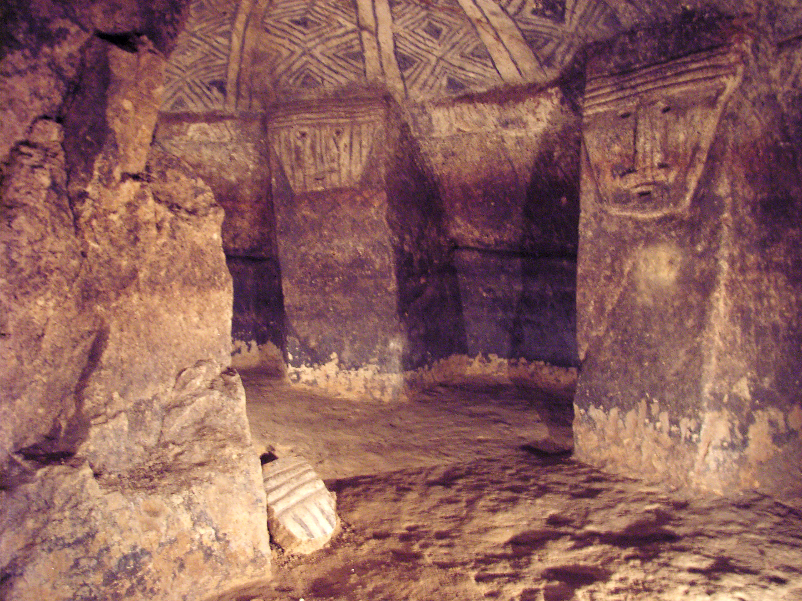 Tierradentro hypogeum